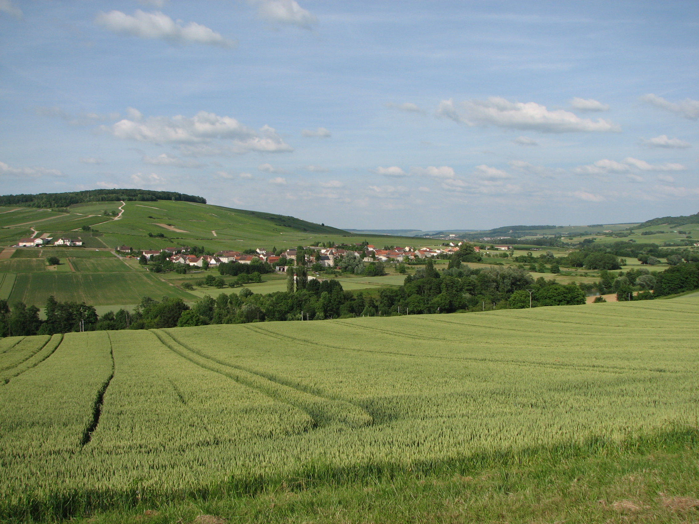 Passy-sur-Marne, vue de Reuilly (D3) de l'autre coté de la Marne